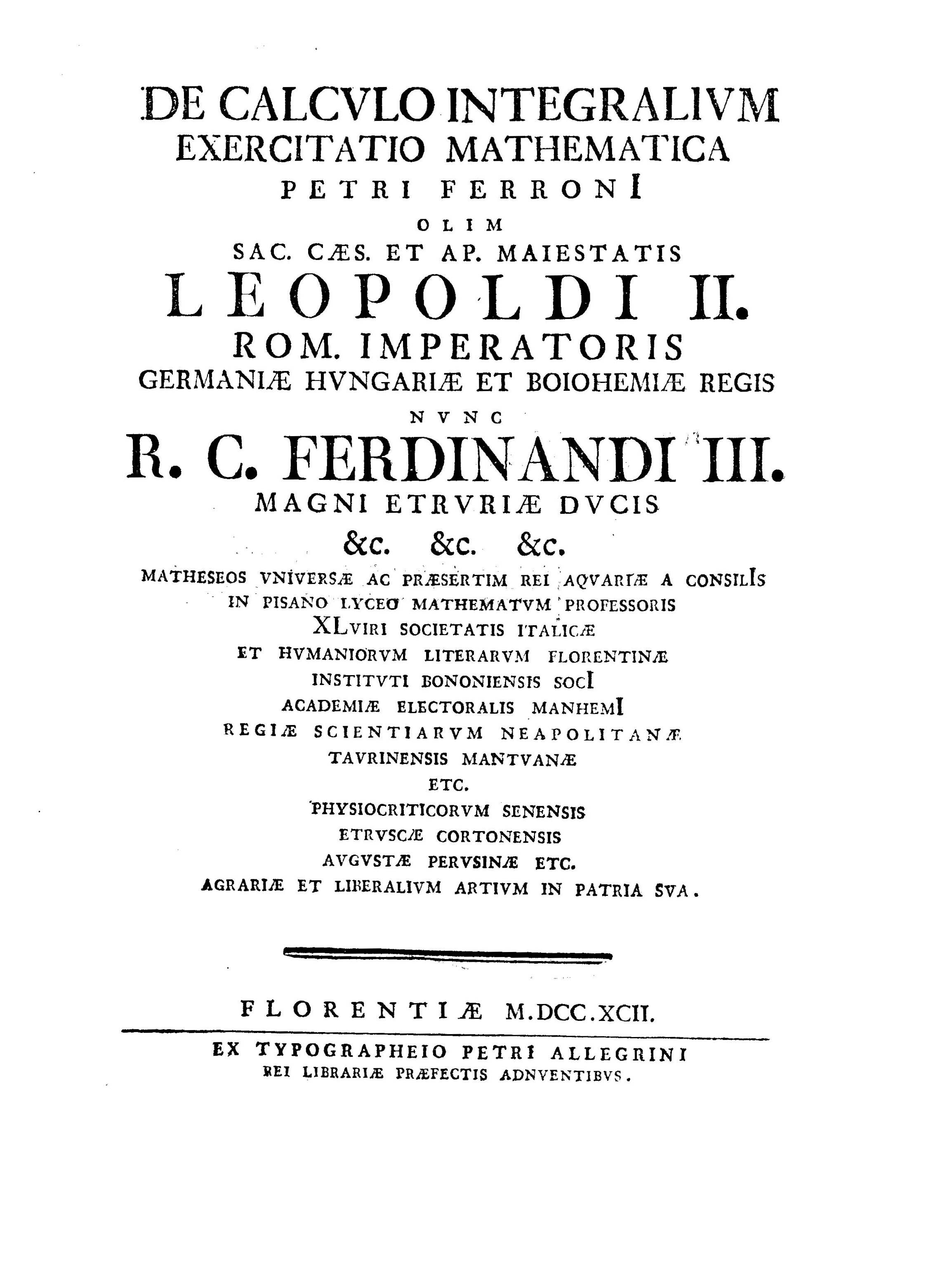 De calculo integralium exercitatio mathematica Petri Ferroni olim ... Leopoldi 2 ... nunc ... Ferdinandi 3 .... - Florentiae : ex Typographeio Petri Allegrini, 1792. - [2], XLVI, 344 p., 3 c. di tav. ripiegate : ill. ; 4º .